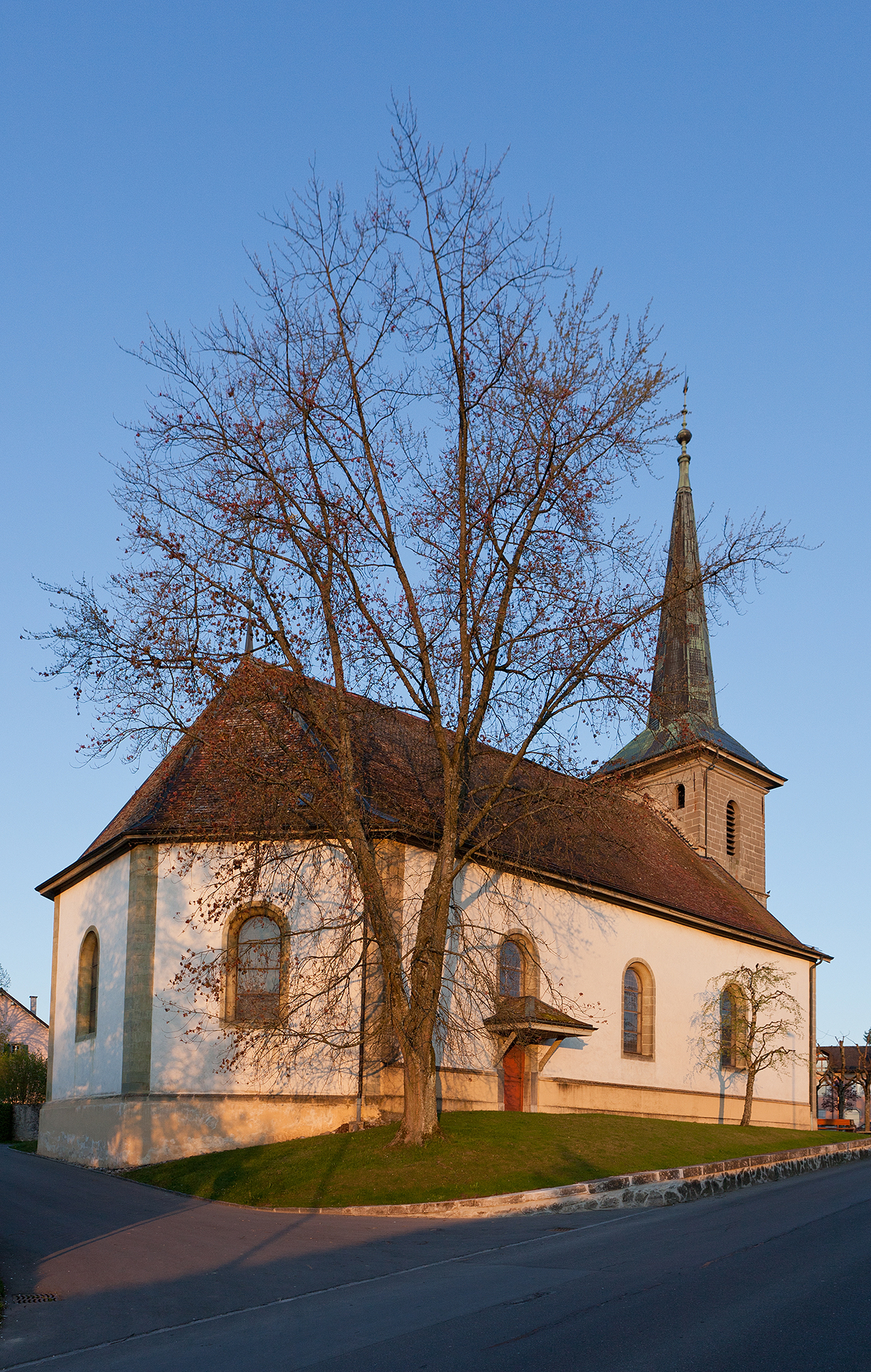 Kirche in Mézières (VD)